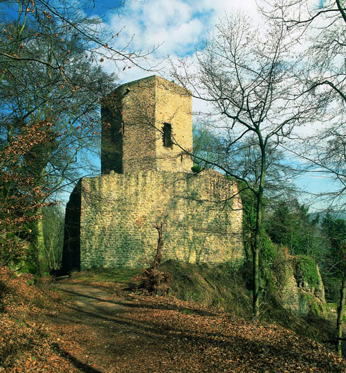 Burg Altwolfstein